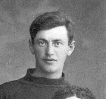 טוביה אברמסון